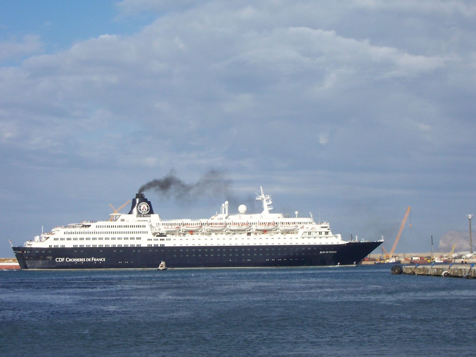 Bleu de France in Palermo, Sizilien, 22. Juni 2010